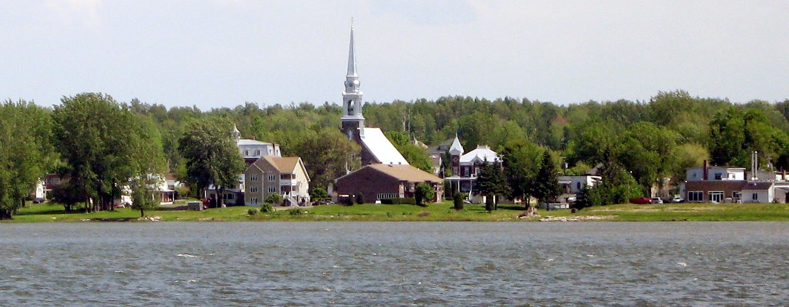 Village de Sainte-Angèle-de-Laval, à Bécancour, vu du Saint-Laurent